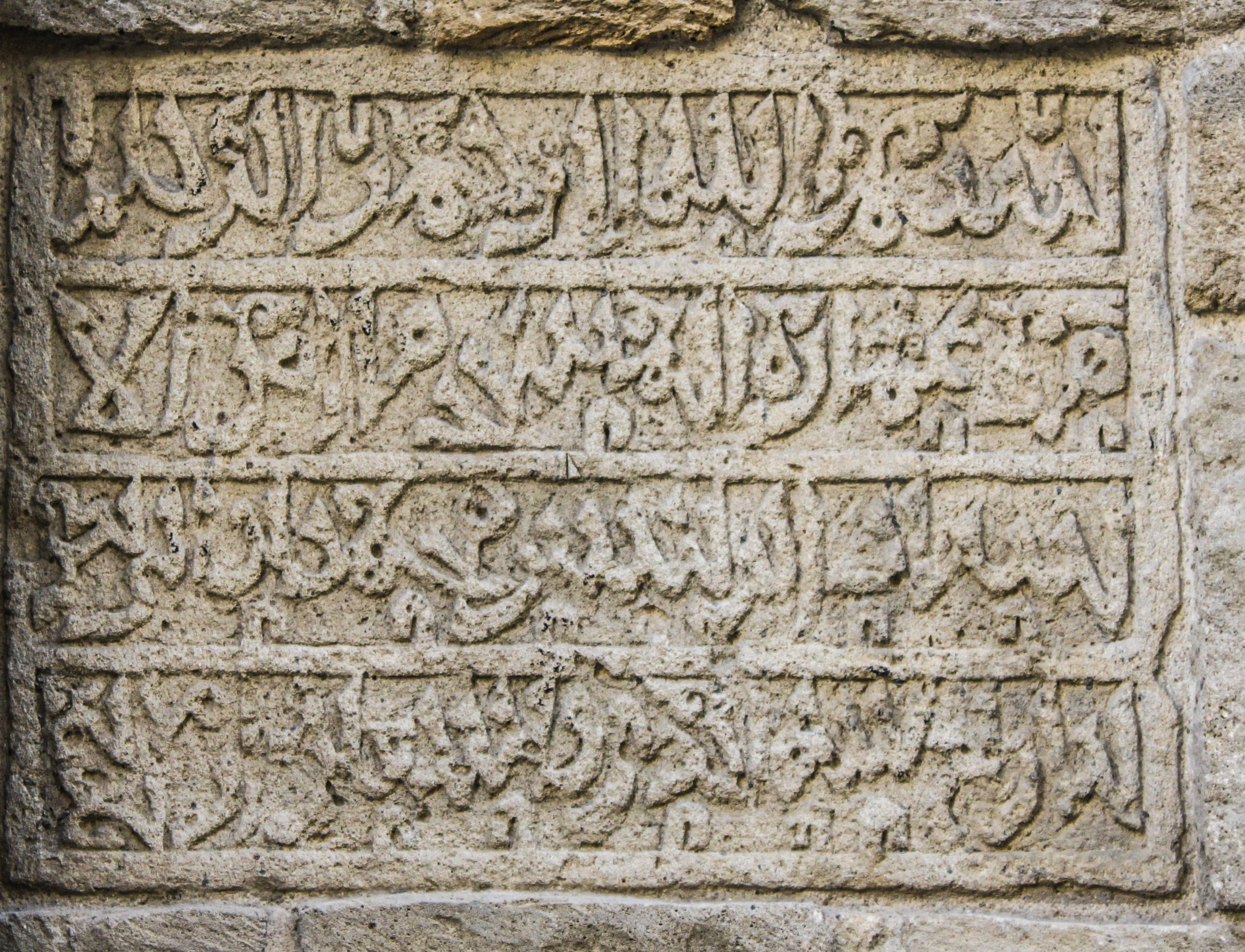 Aşur məscidinin kitabəsi